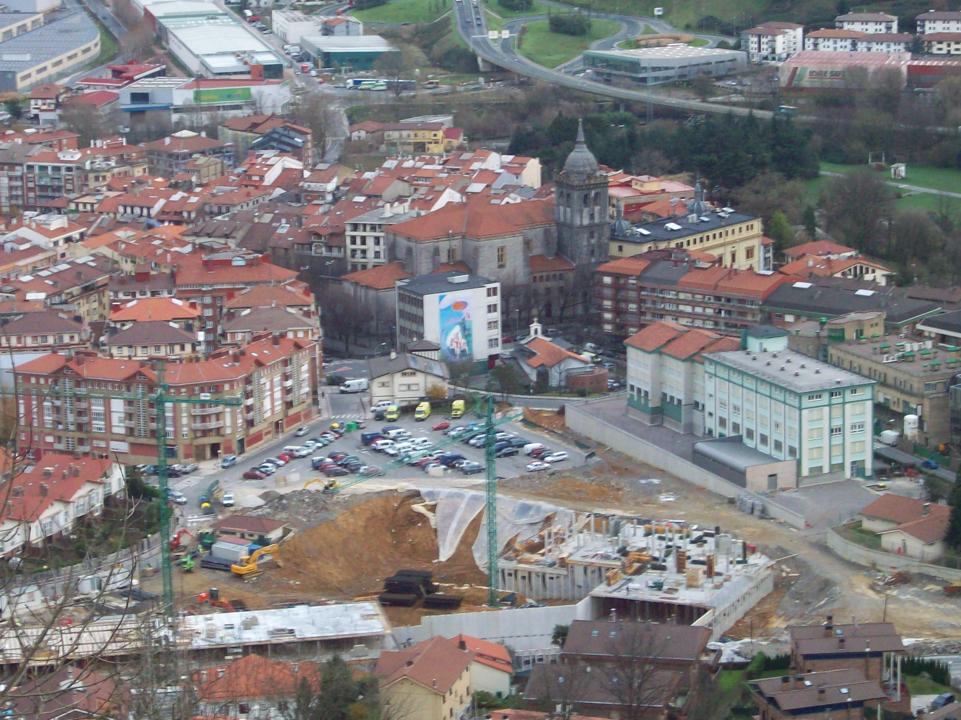 Hernaniko erdigunea. Gipuzkoa, Euskal Herria.